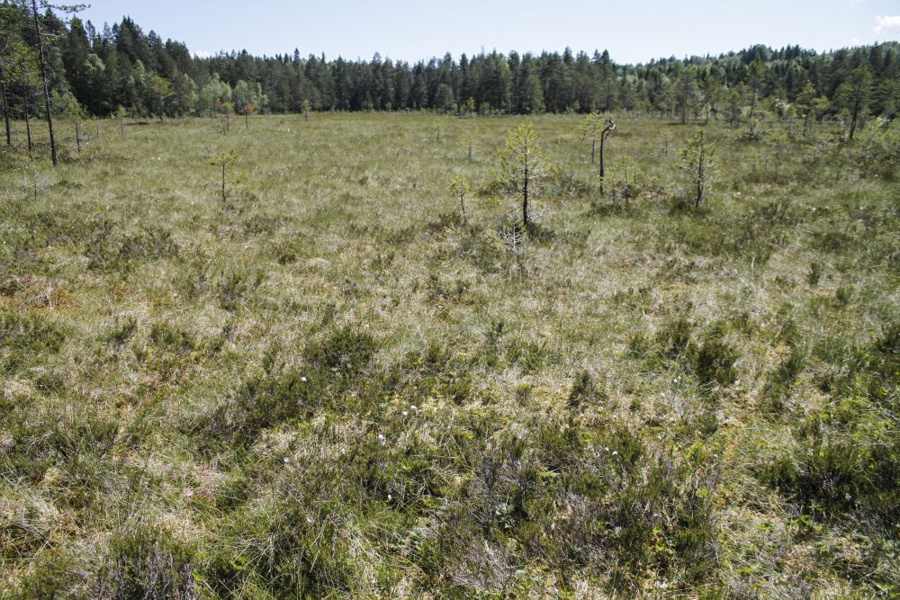 Breimyr er en nedbørsmyr som får næring tilført med regnvannet.